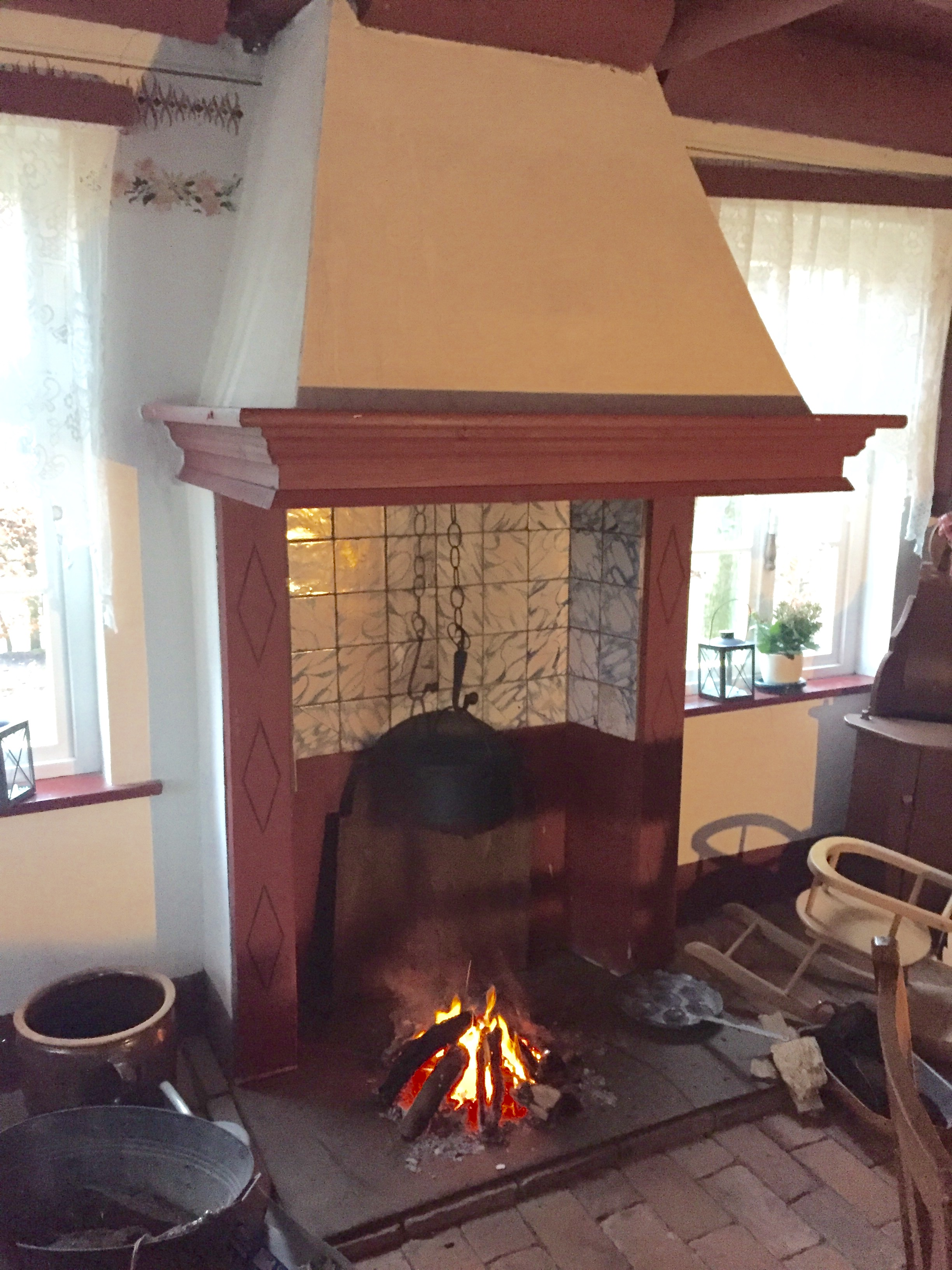 Kochen über offenem Feuer in einem Haus des 19 Jahrhunderts im Moormuseum Moordorf.